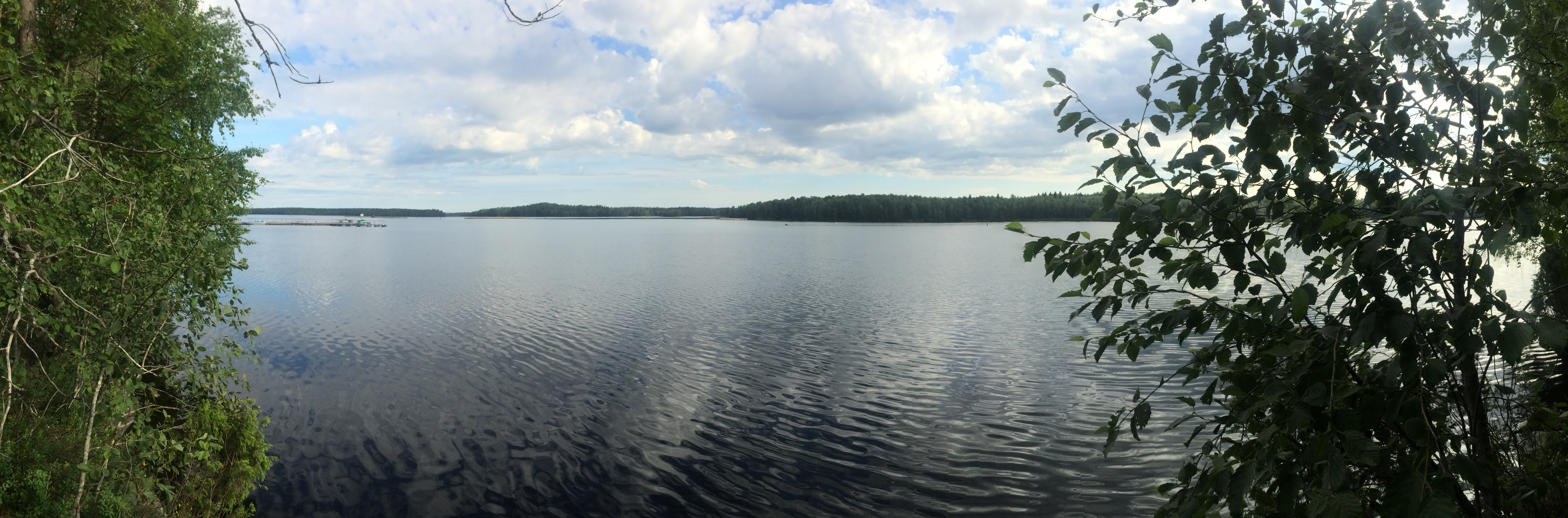 Семчозеро